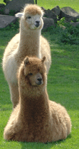 zwei Alpakas